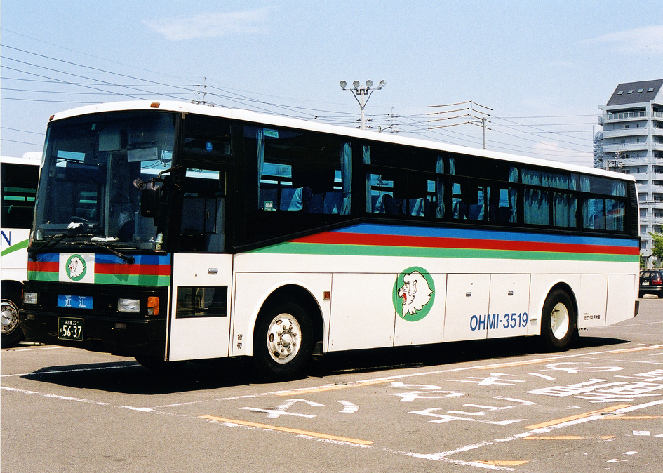 湖国バス 近江バス名古屋 日産ディーゼル・スペースアロー P-RA53TE 富士重車体 HD-1